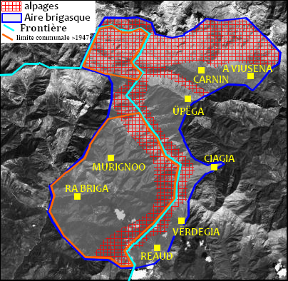 La Terre brigasque, entre deux frontières et quatre communes.